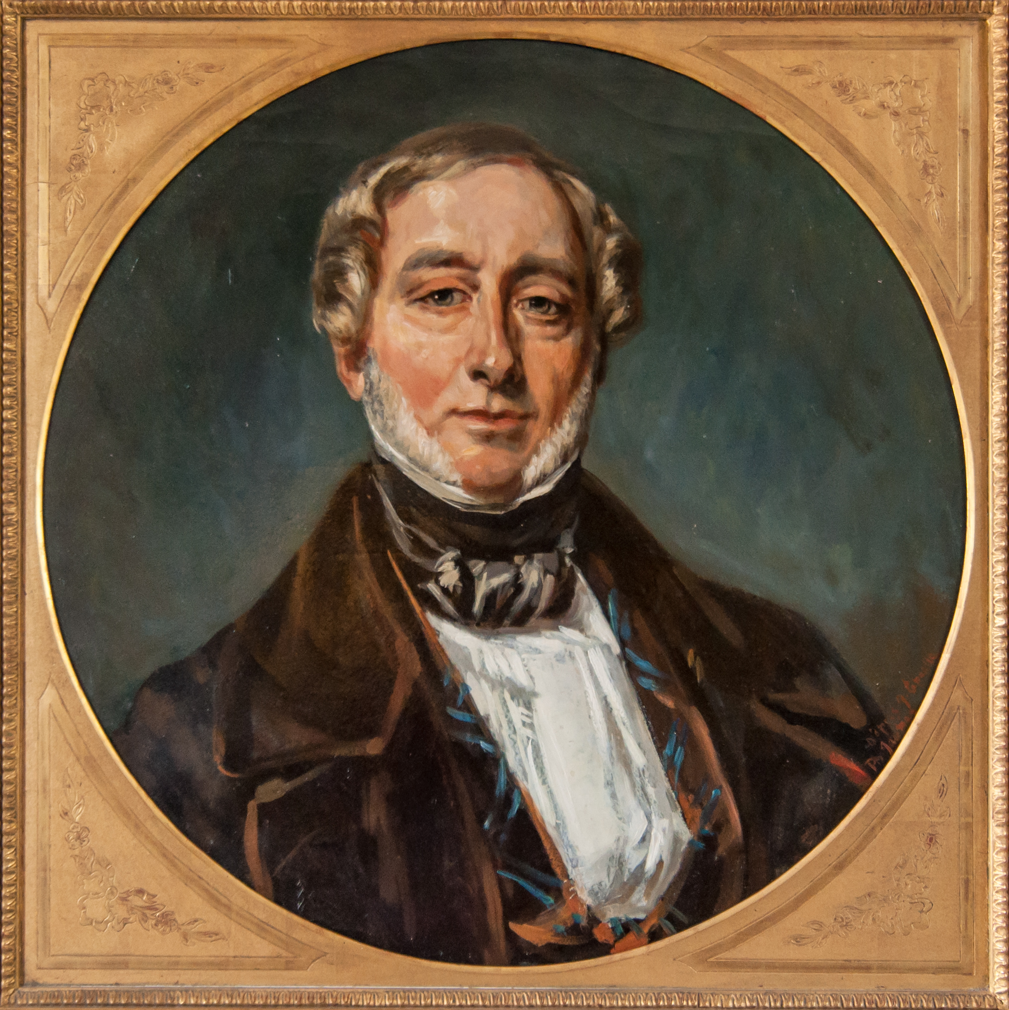 Thomas de Colmar, portrait au château de Maisons-Laffitte.